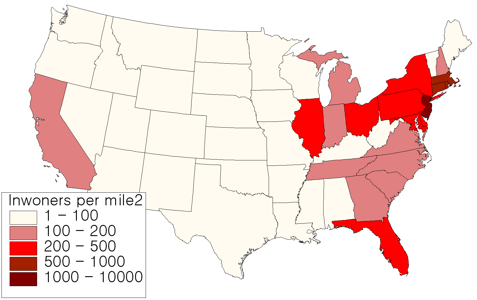 Zelf gemaakte media. gegevens obv tabellen uit